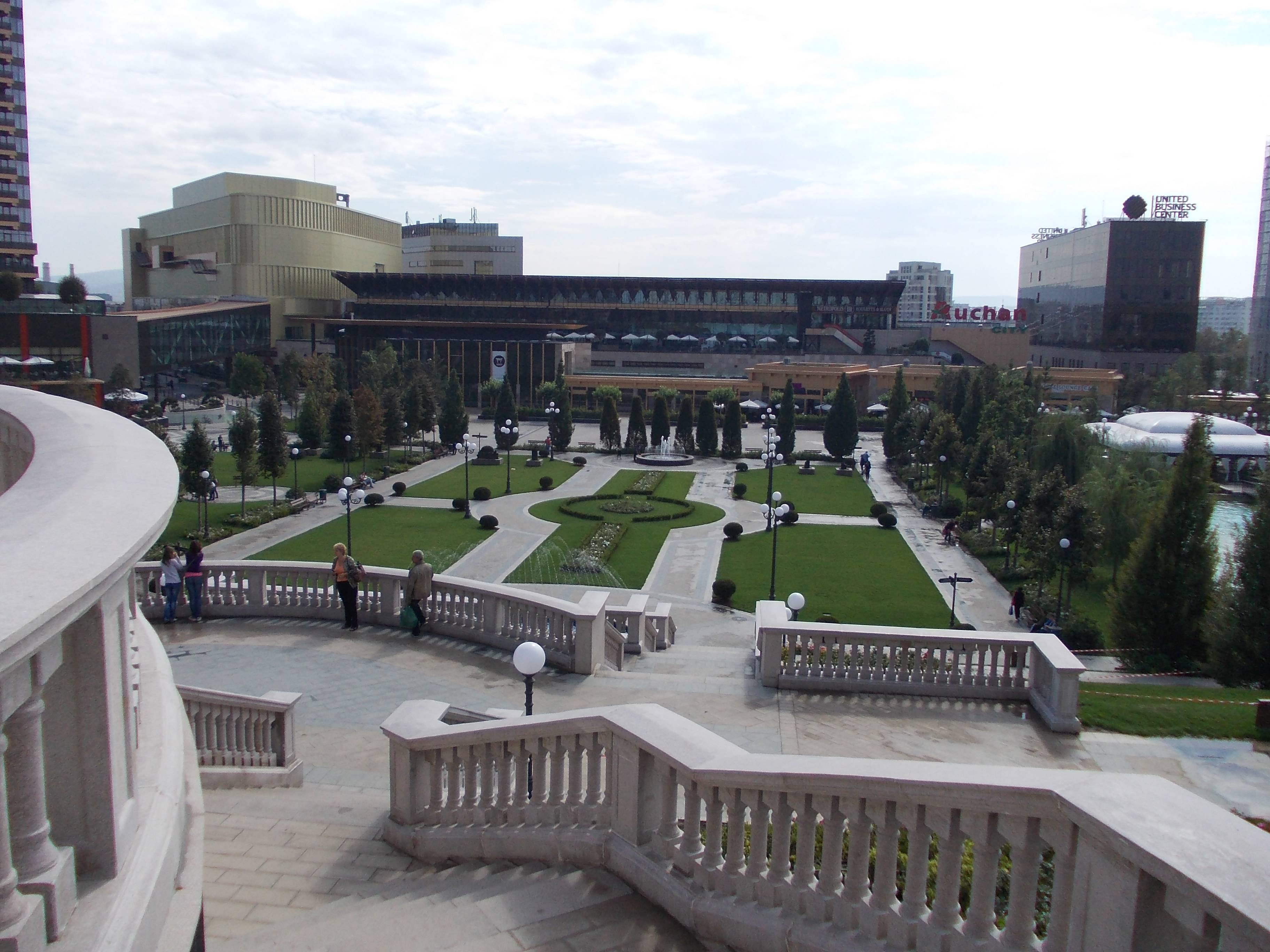 Ansamblul Palas văzut de pe scările ce duc la Palatul Culturii